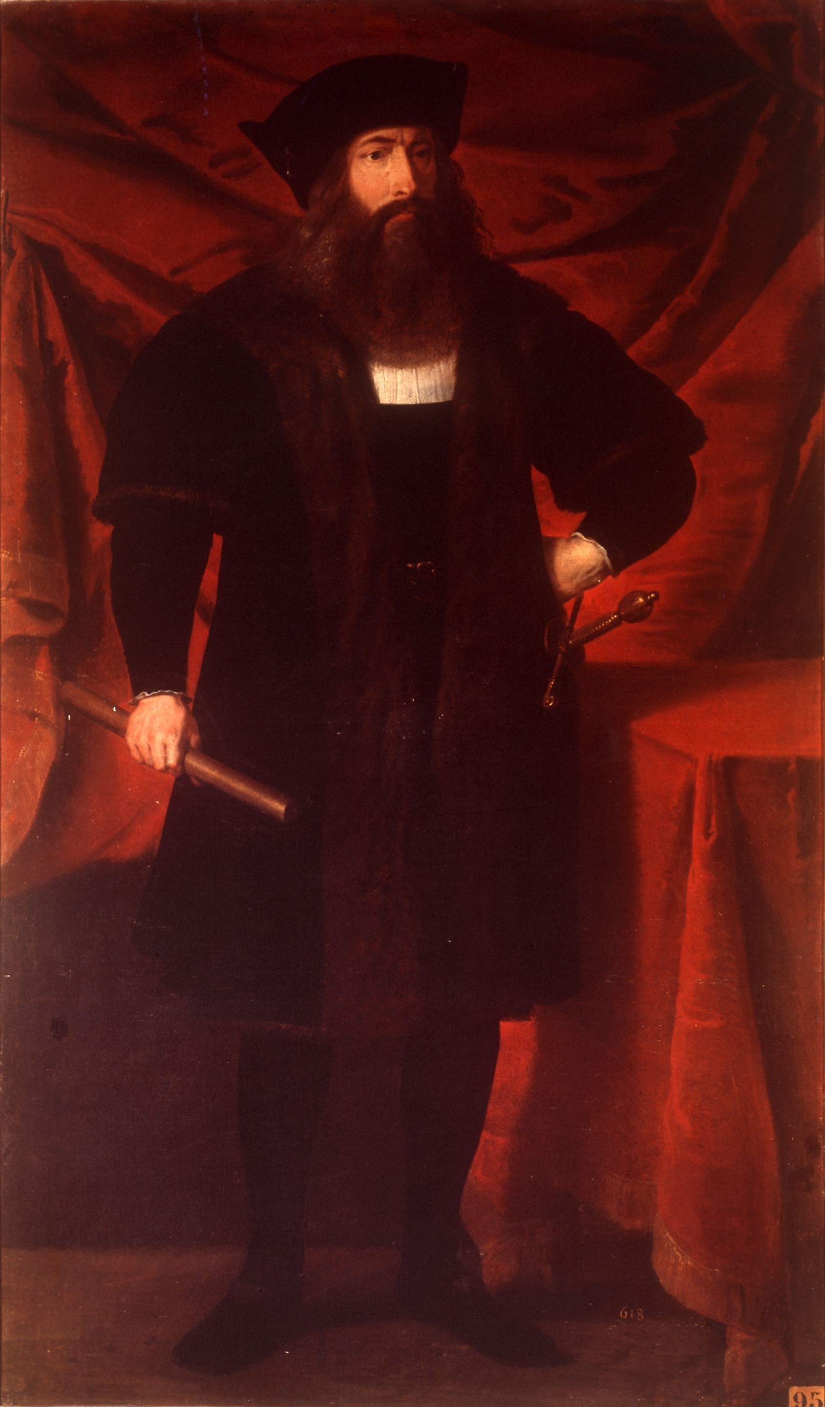 Retrato del militar francés Odet de Cominges (1485-1528), que fue conde de Cominges, vizconde de Lautrec y de Vilamur, mariscal de Francia y general del ejército francés en Italia en el siglo XVII. Es una obra anónima de la escuela flamenca.